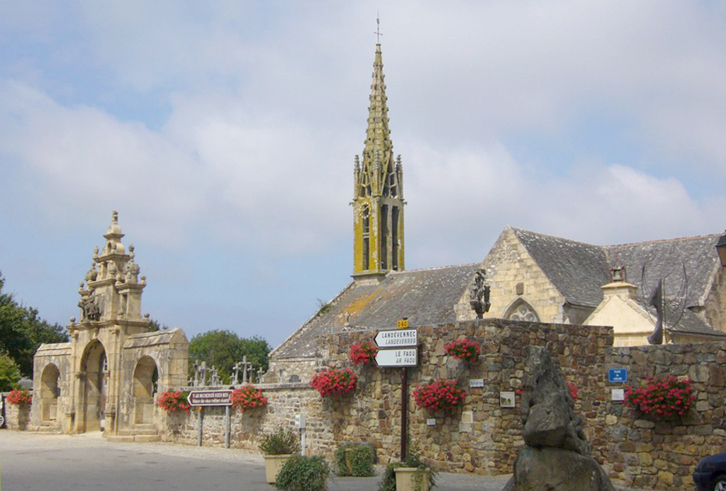 Auteur: Utilisateur:Suaudeau